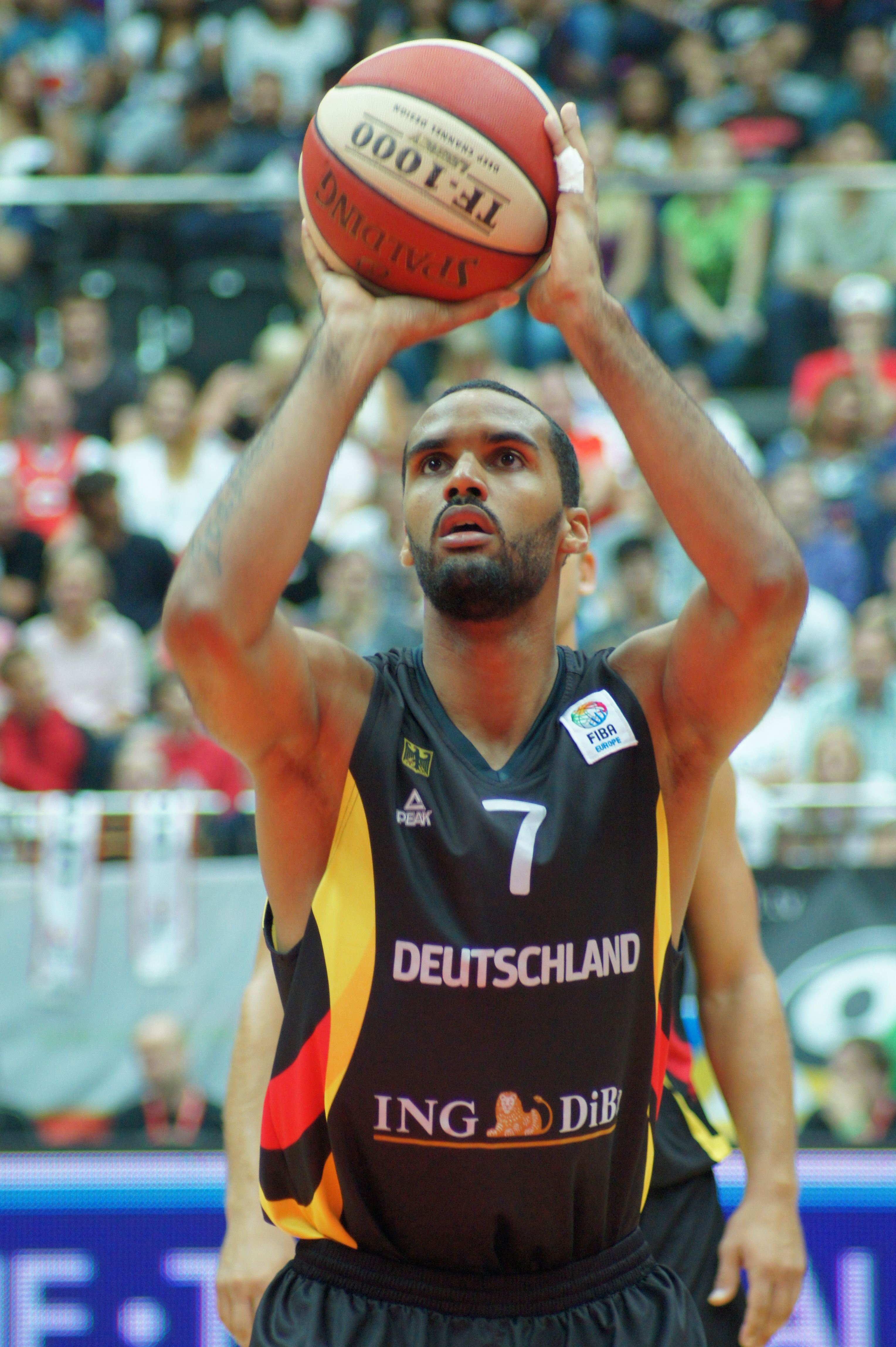 Qualifikationsspiel EuroBasket Österreich - Deutschland, 13. August 2014 im Multiversum Schwechat.